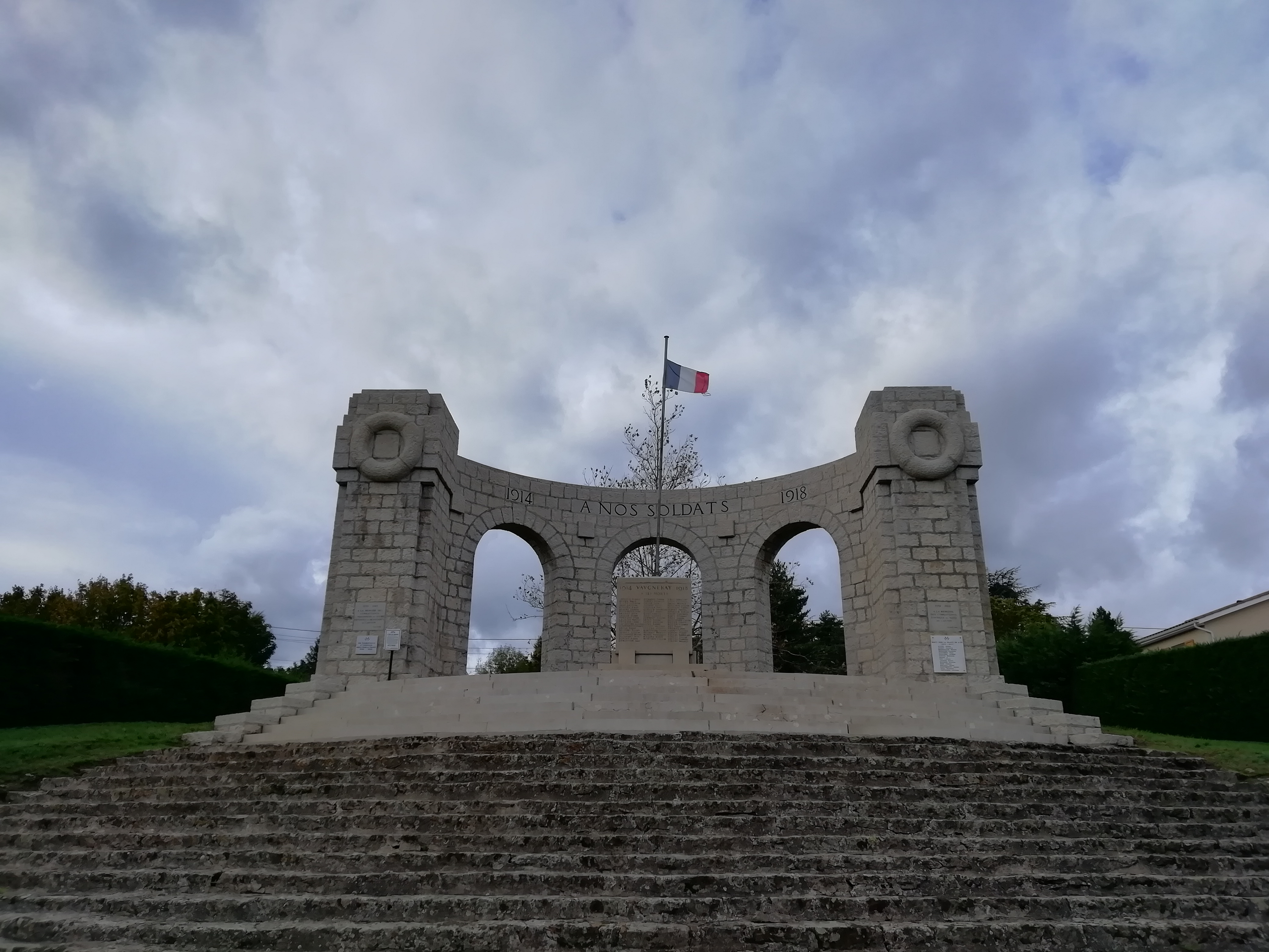 Vaugneray (Rhône) - Monument aux morts du canton, vue d'ensemble